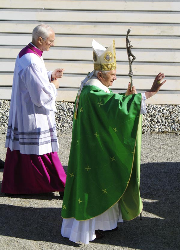 Papst Bendikt in München